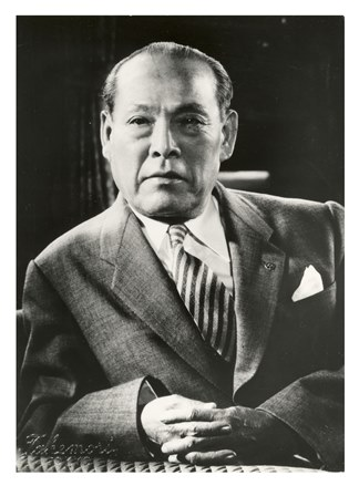 帝国ホテル元社長 犬丸徹三氏 肖像写真